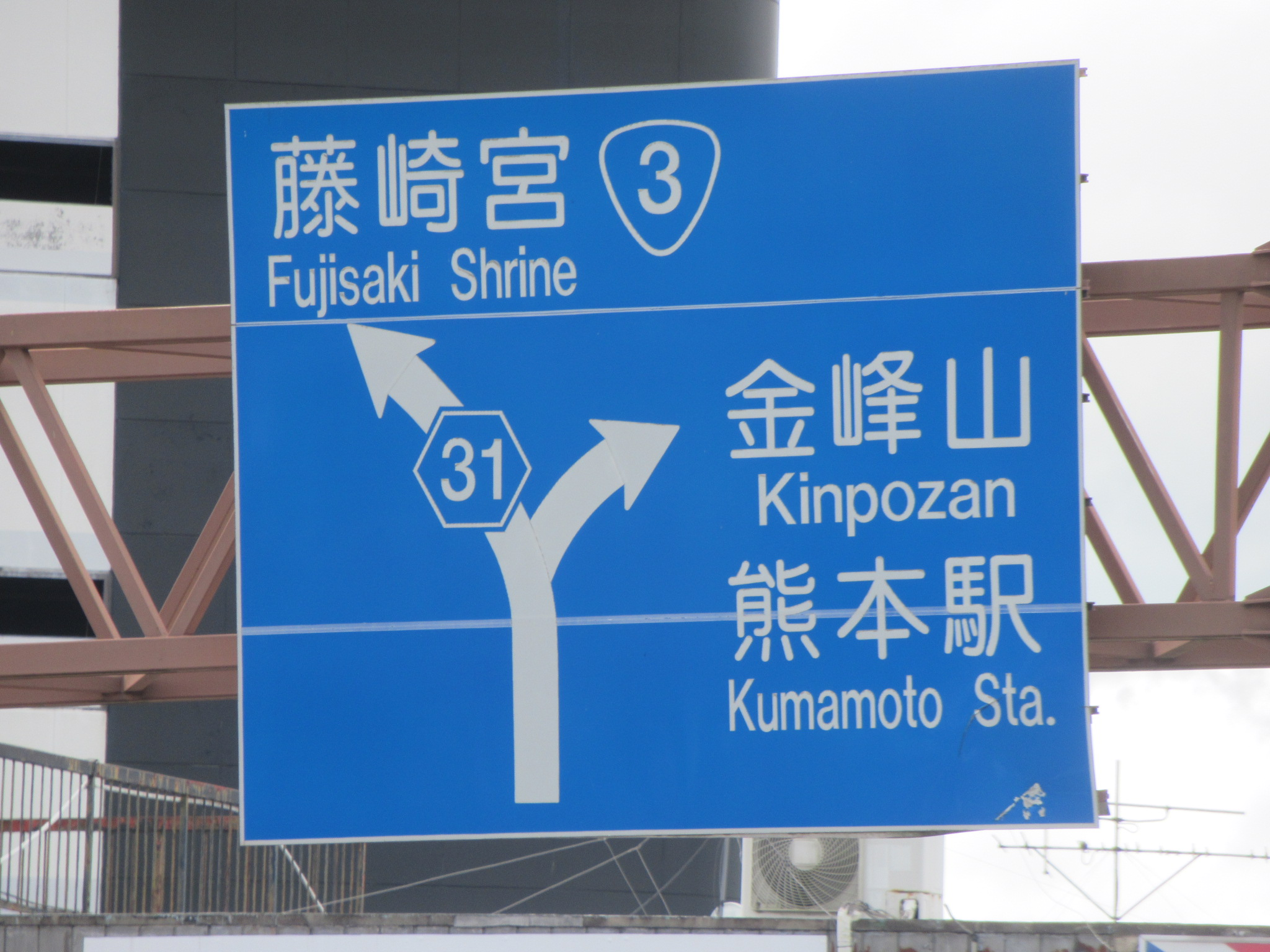 上熊本駅付近に設置されている道路標識